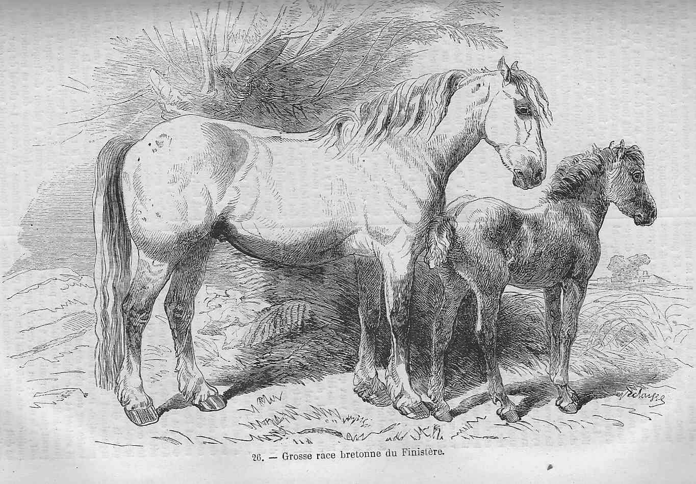 Cheval de grosse race bretonne du Finistère